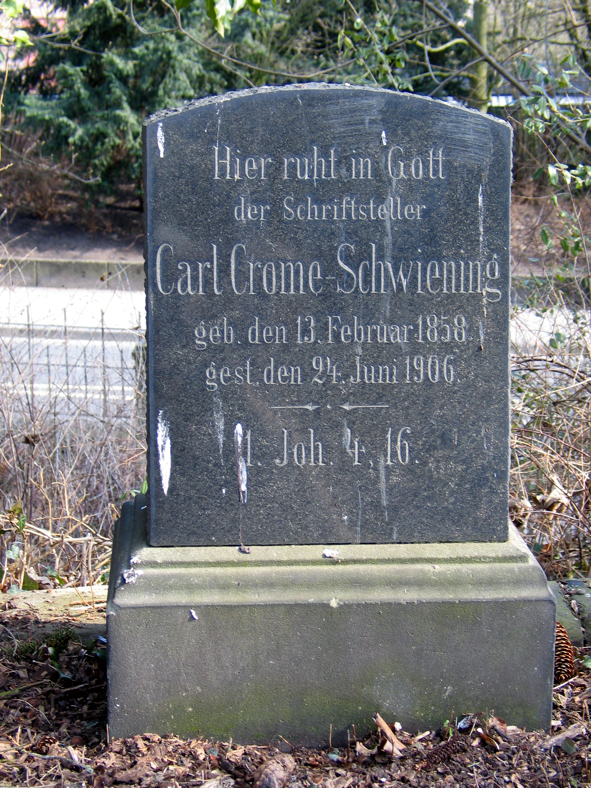 Foto vom Helentorfriedhof, östlicher Teil ...